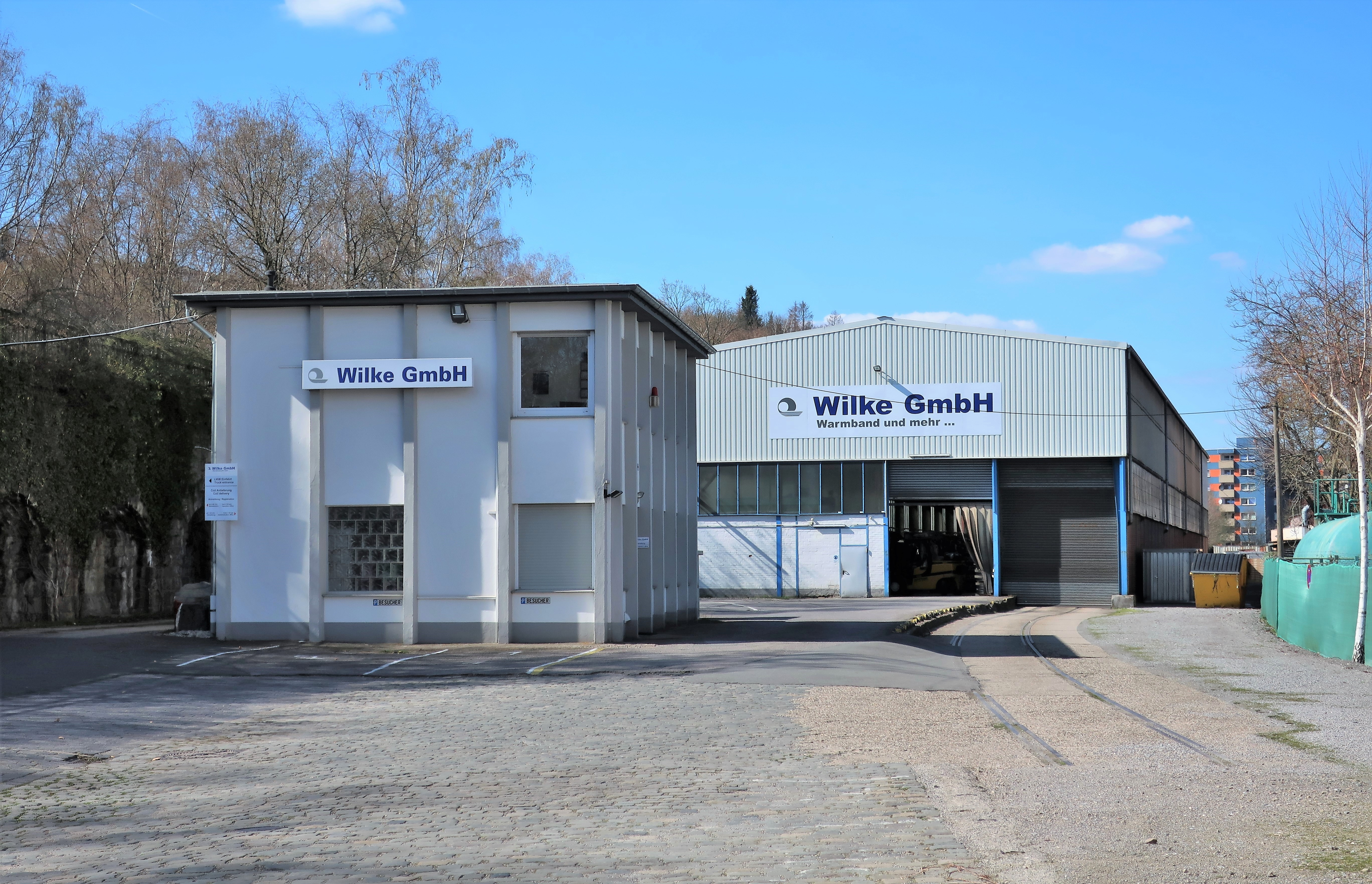 Warmband Wilke GmbH in Hagen-Oberhagen, Eilper Straße 113A. Ein Unternehmen der Risse & Wilke Gruppe.